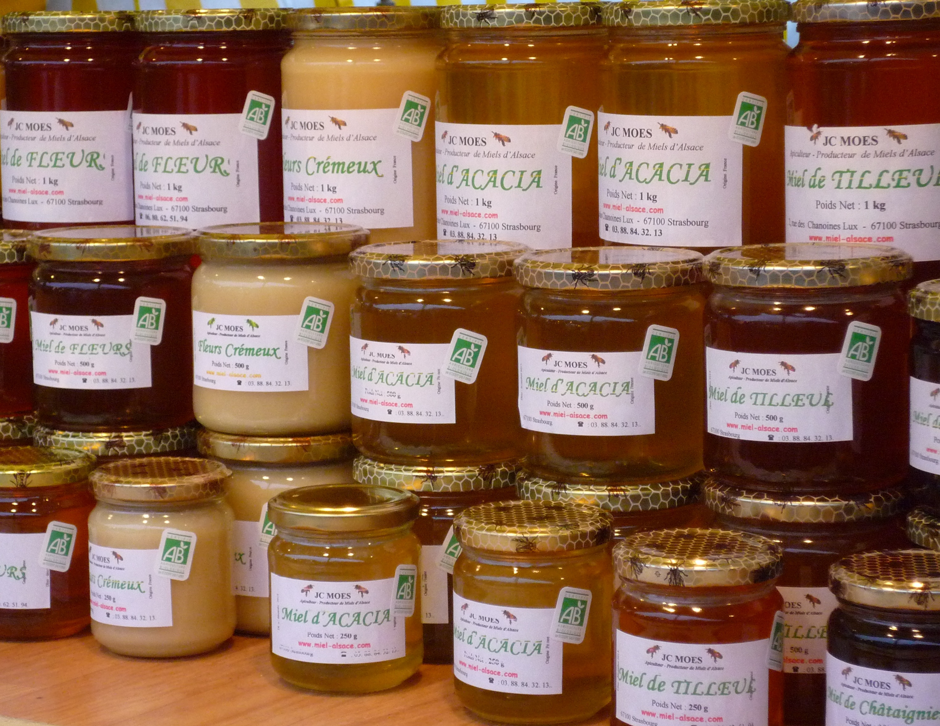 Miel d'Alsace issu de l'agriculture biologique.